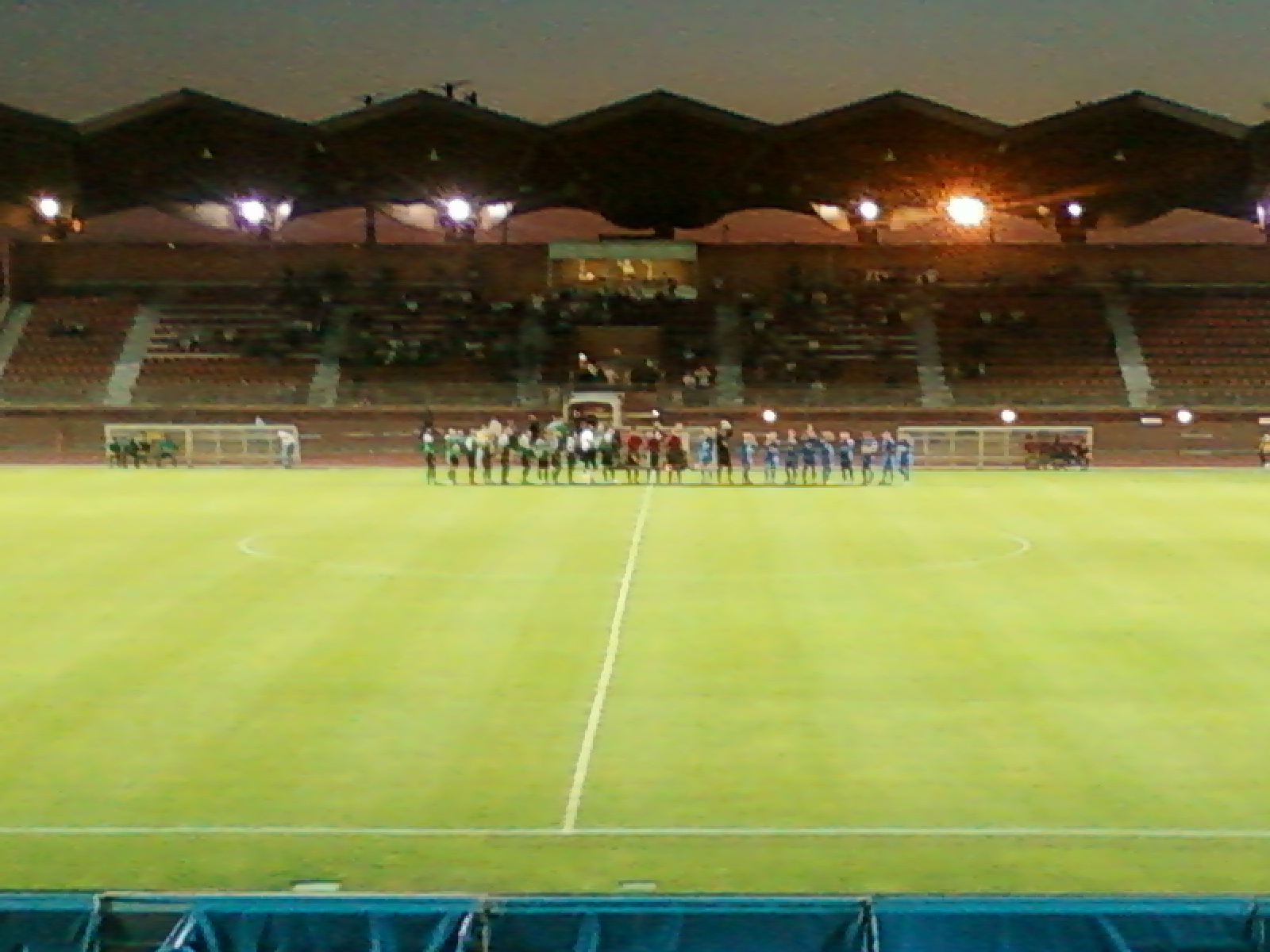 US Créteil - Colmar National Présentation